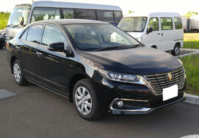 トヨタ・プレミオ